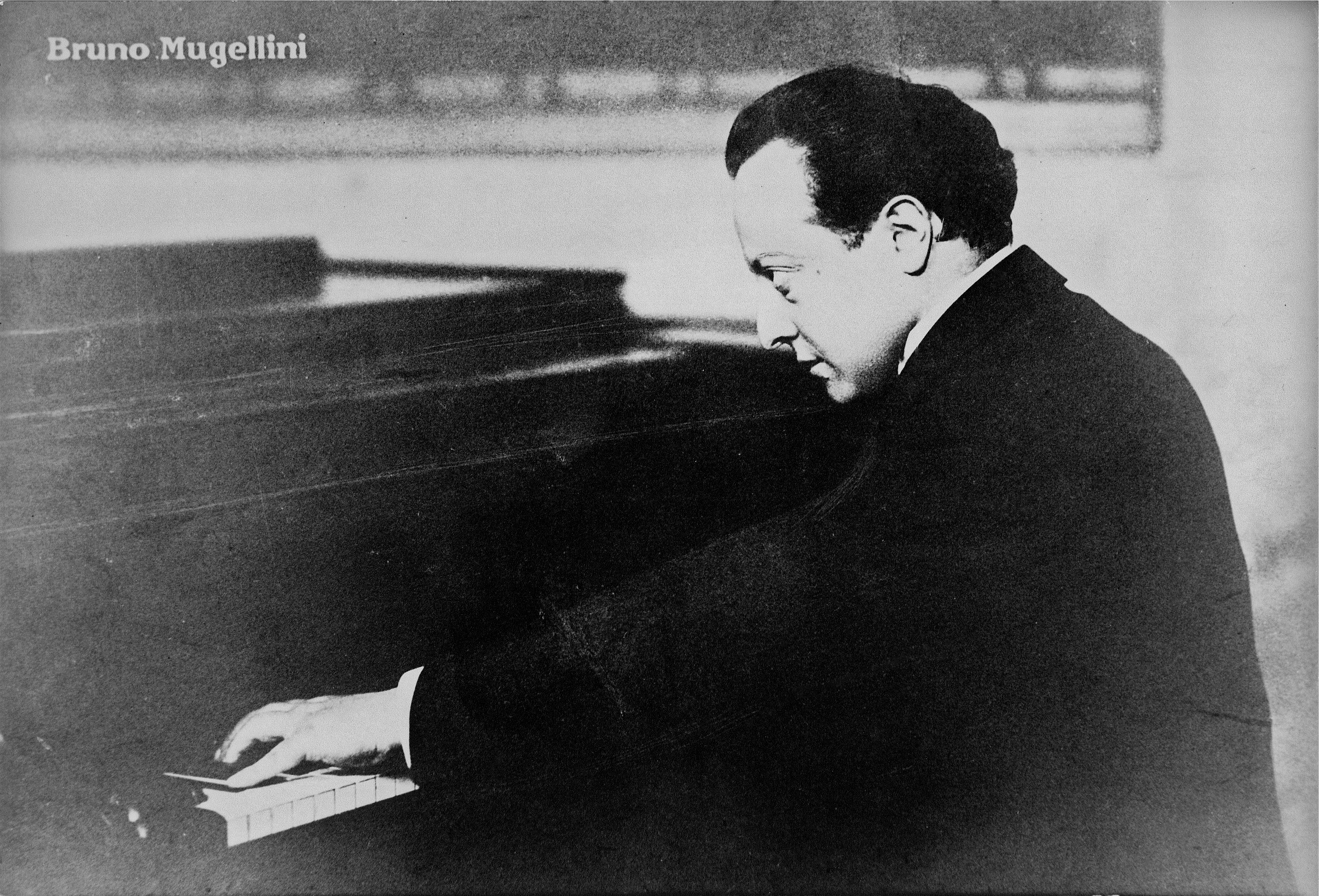 Foto di Bruno Mugellini al pianoforte.